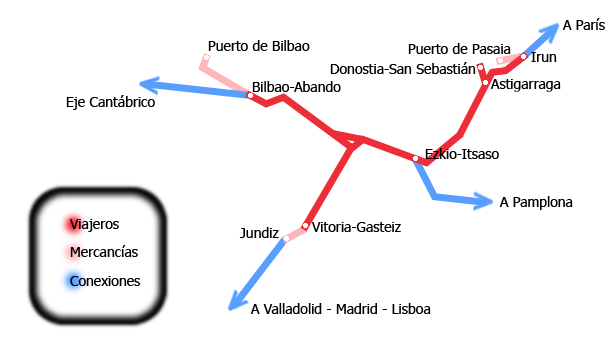 euskal y mapa / mapa y vasca